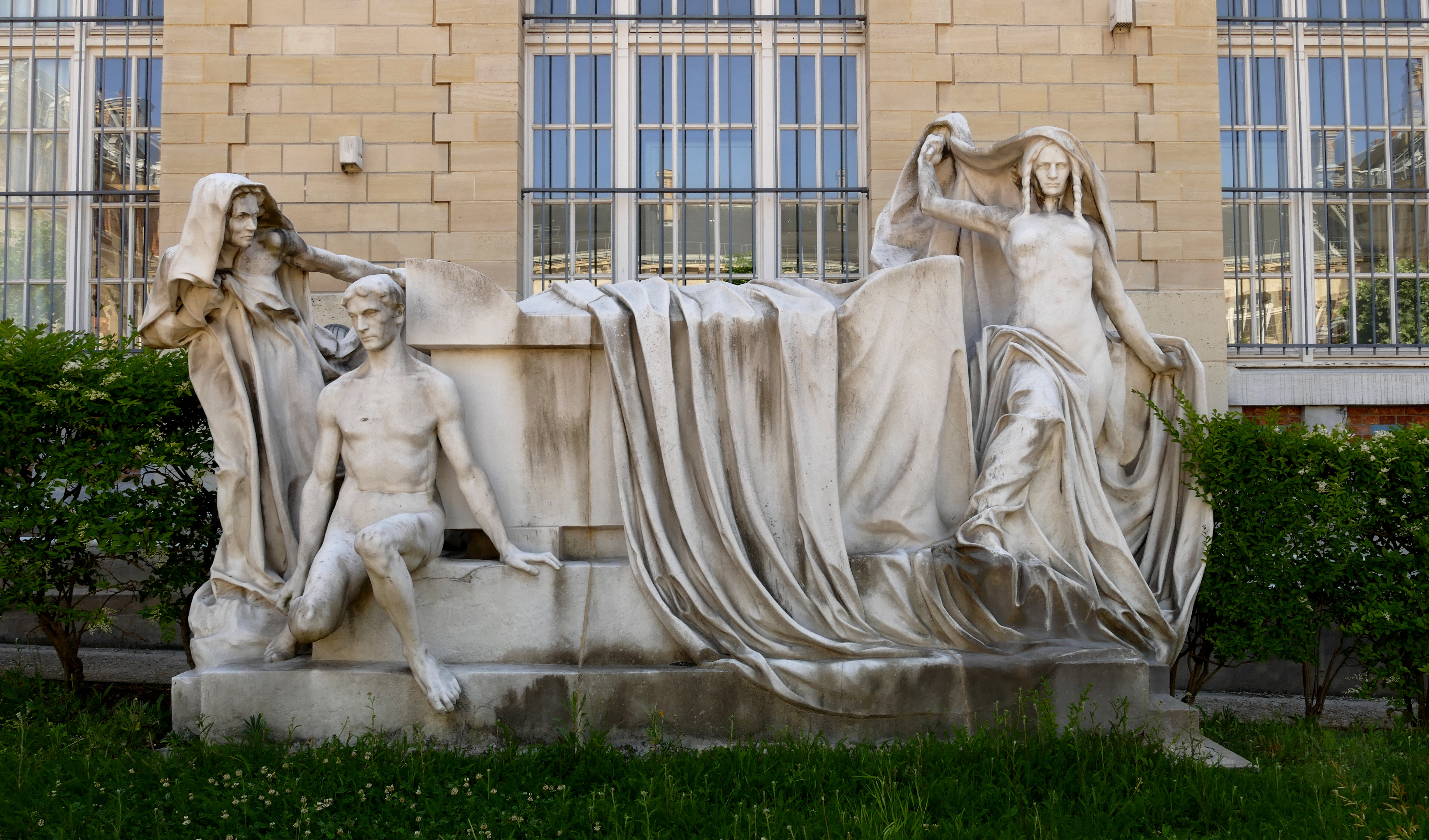 Monument de Voltaire marbre, 1907, sculpteur Victor Segoffin, destiné à l'origine au Panthéon de Paris, actuellement dans la cour d'honneur du lycée Voltaire (Paris, 11e arrond.)